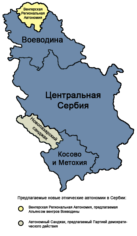 Карта Сербии с предложенными новыми этническими автономиями